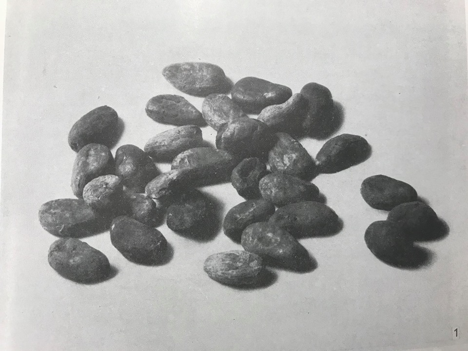 Kakaové boby, Peru Zdroj: Em. Nohejlová-Prátová, Základy numismatiky, Tab. I 2)